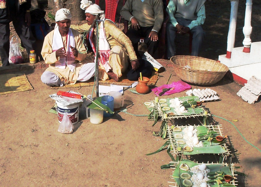 অসমীয়া: মে-দাম-মে-ফি